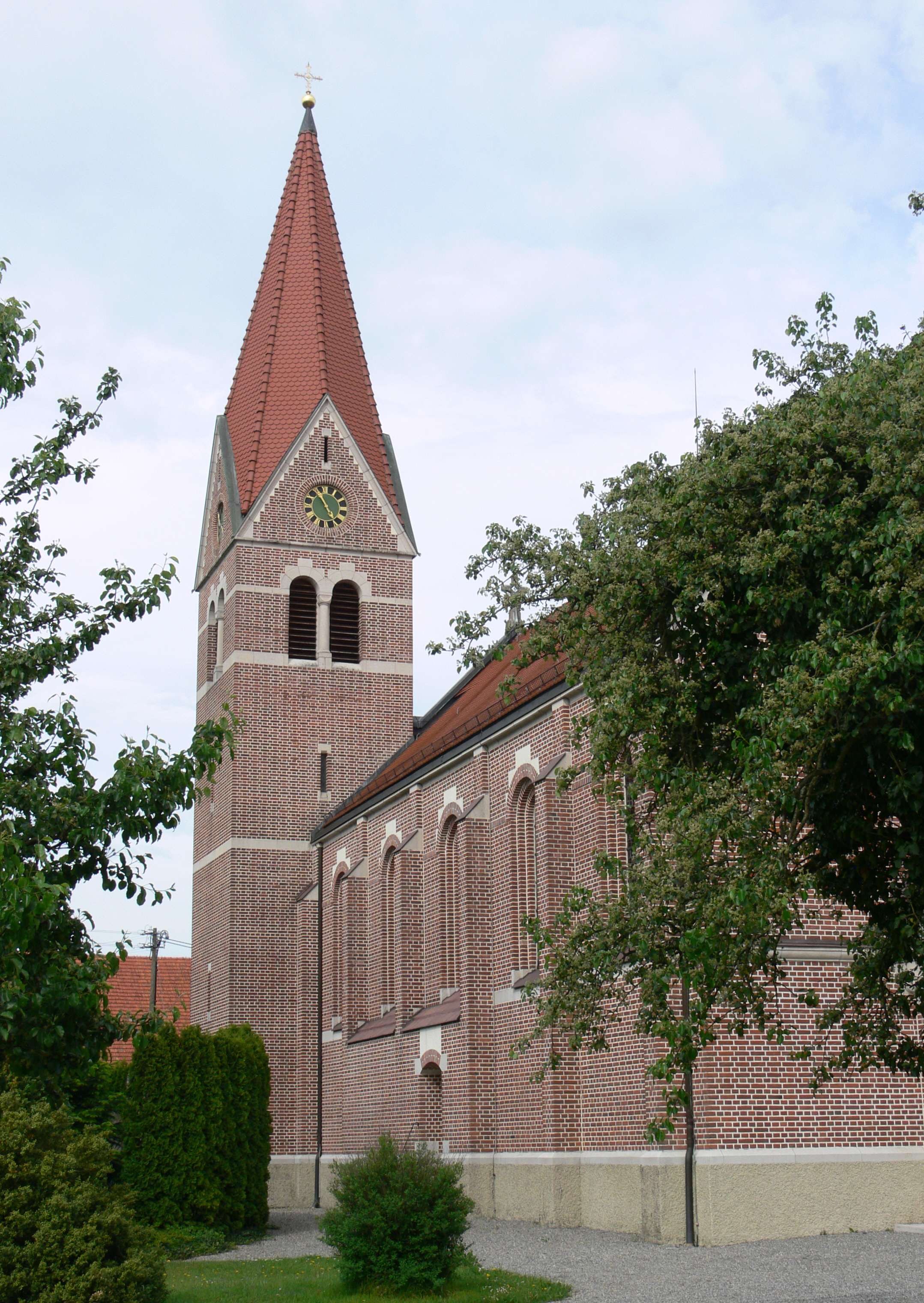 Pfarrkirche St. Wendelin, Oberdorf, Gemeinde Langenargen